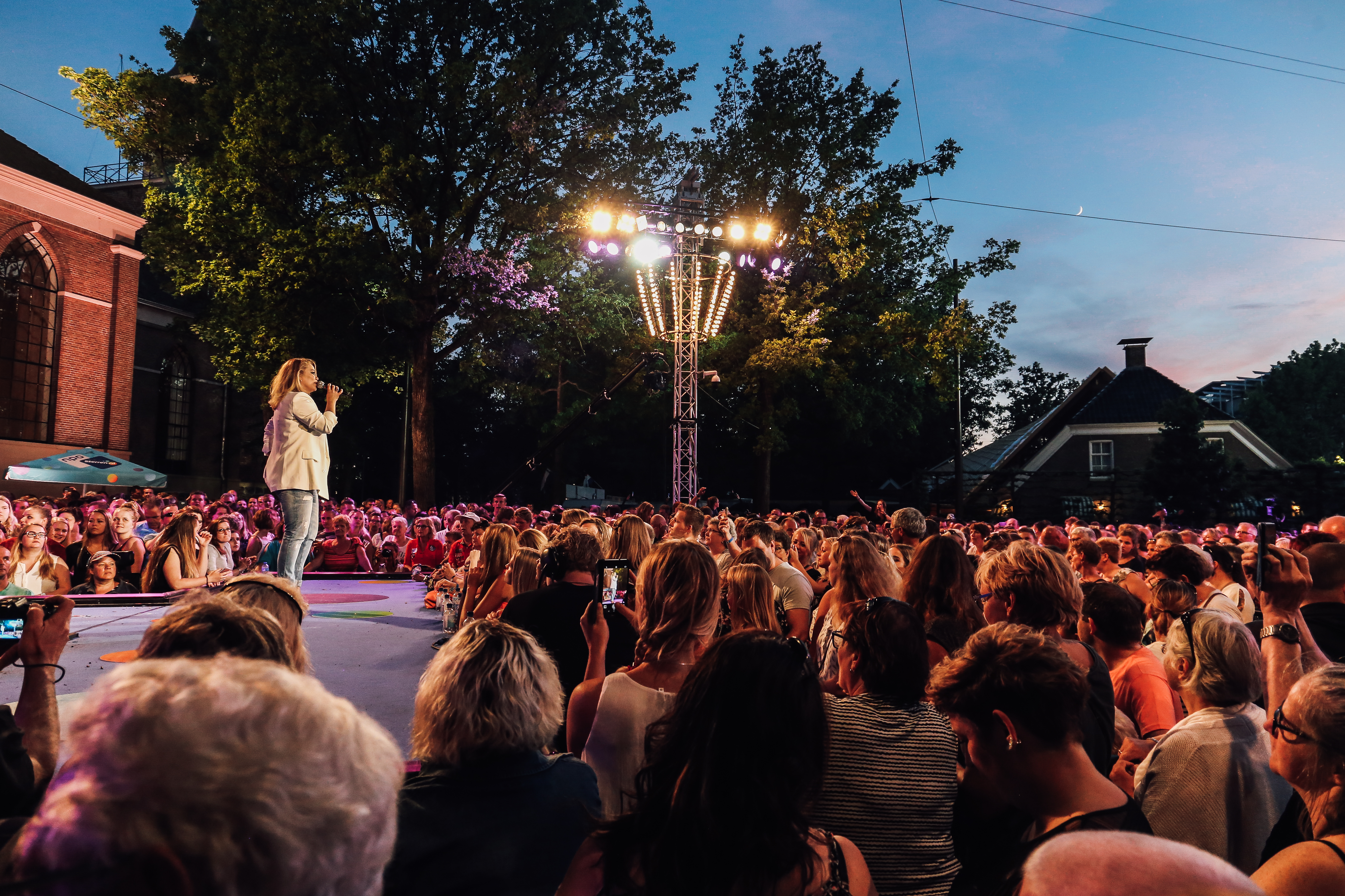 Antje Monteiro tijdens het Muziekfeest op het Plein: Emmen